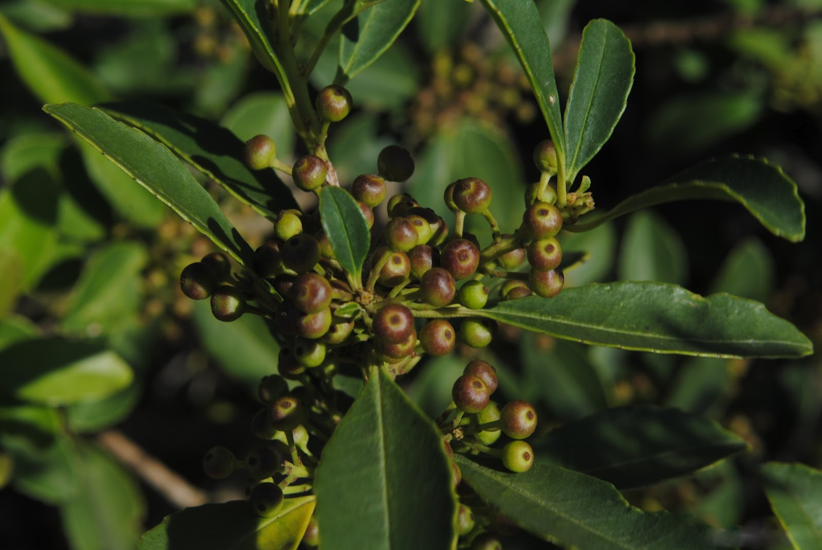 Ilex dumosa. Aquifoliaceae. Fotos tomadas en paredón rocoso del Cerro Buena Vista en el departamento de Rivera, Uruguay.